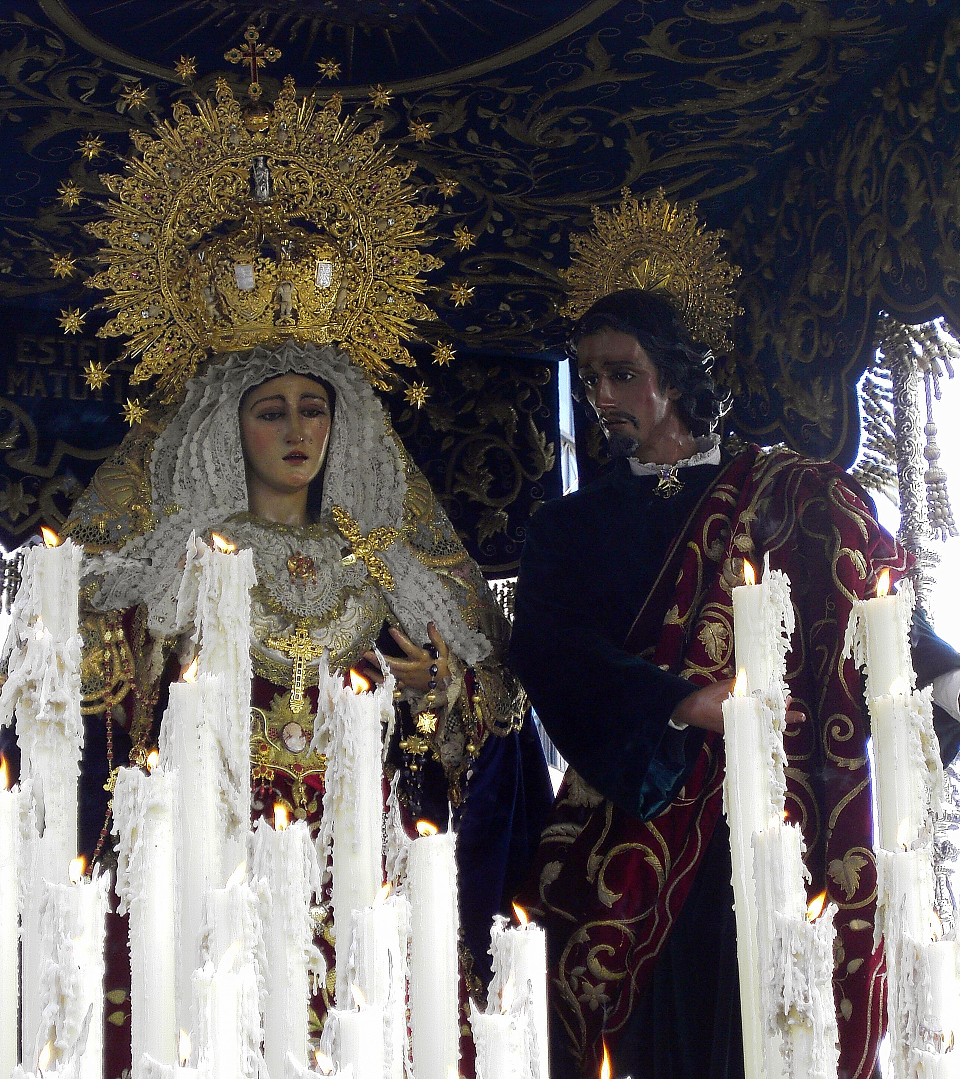 Semana Santa Huelva: Virgen de la Amargura